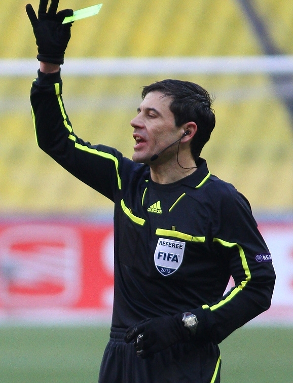 Милорад Мажич на матча Лиги Европы 2011/12 "Рубин" Казань - "Олимпиакос" Пирей.